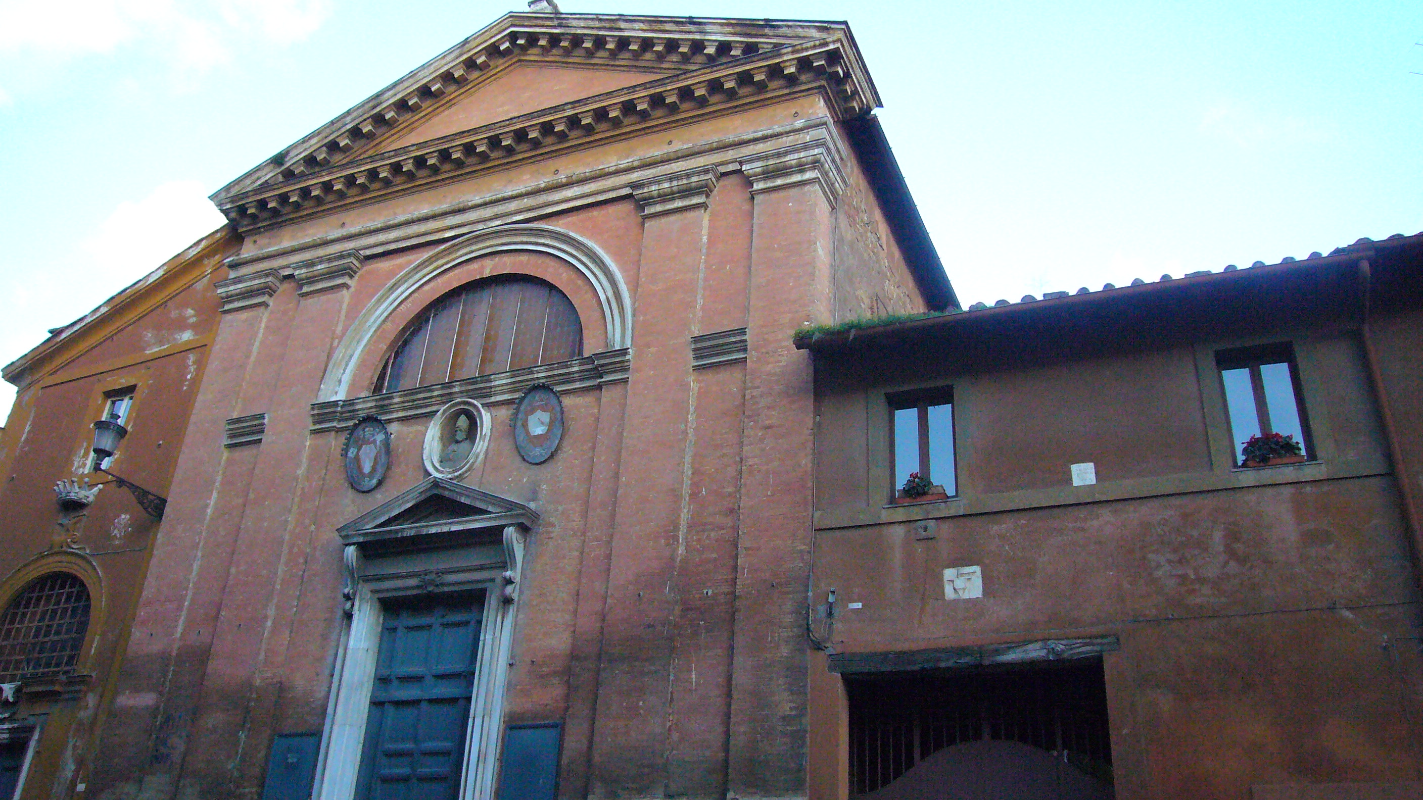 Roma, Sant'Eligio dei Ferrari